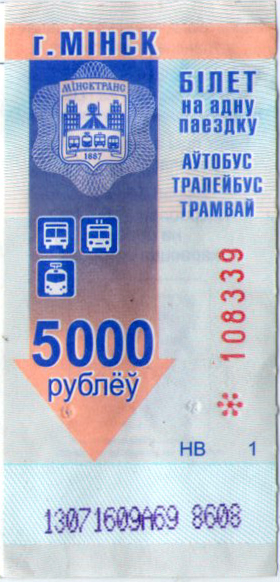 билет на минский городской транспорт, 2015